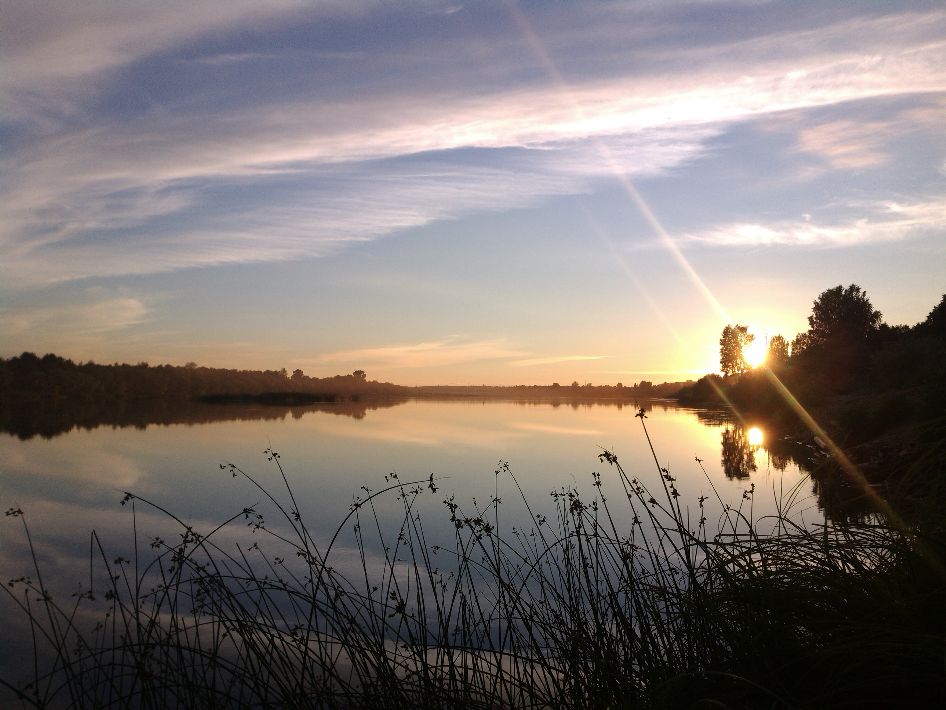 Luza, Kirov Oblast, Russia